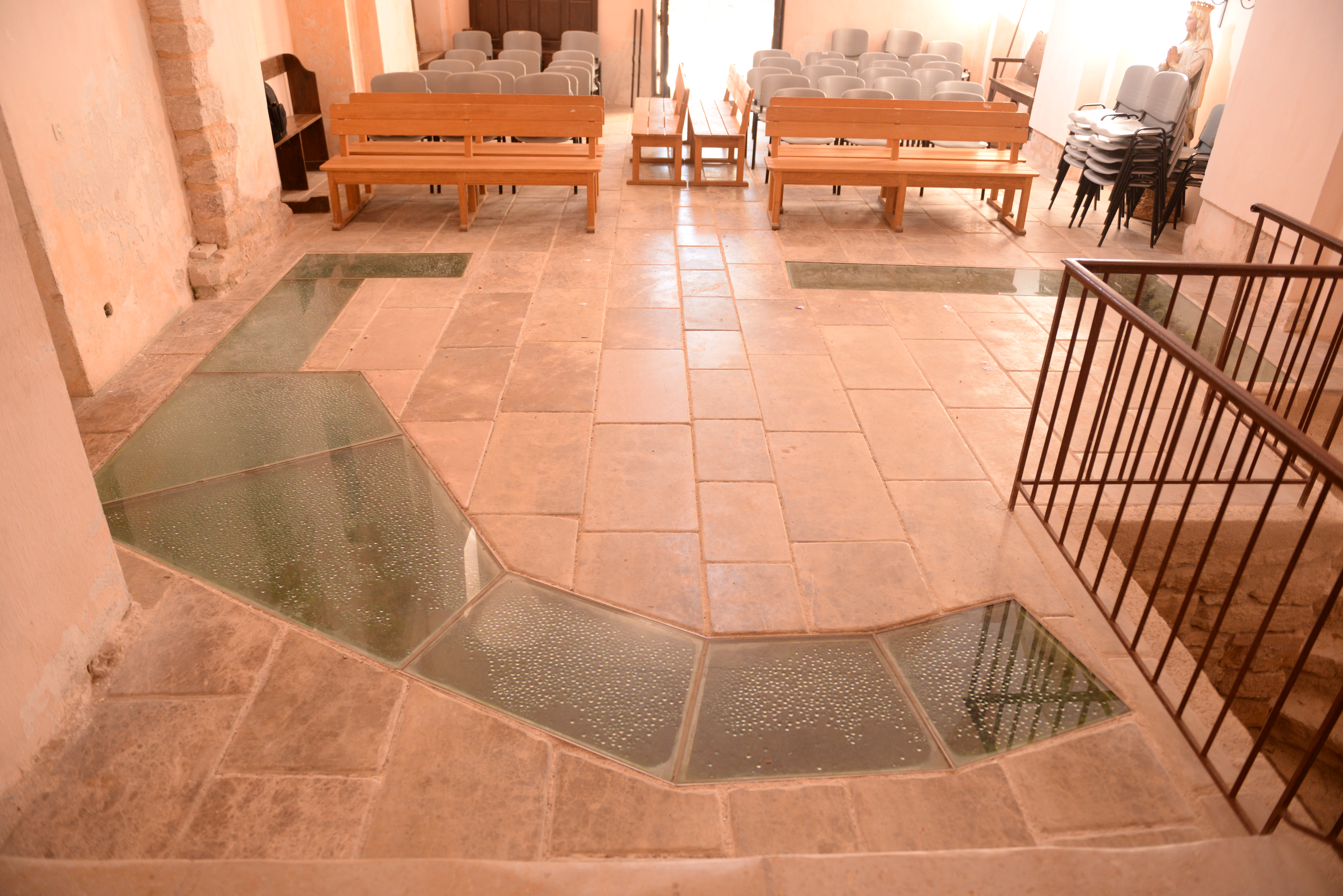 Vue de l'intérieur de l'église Notre-Dame du Brusc de Châteauneuf-Grasse